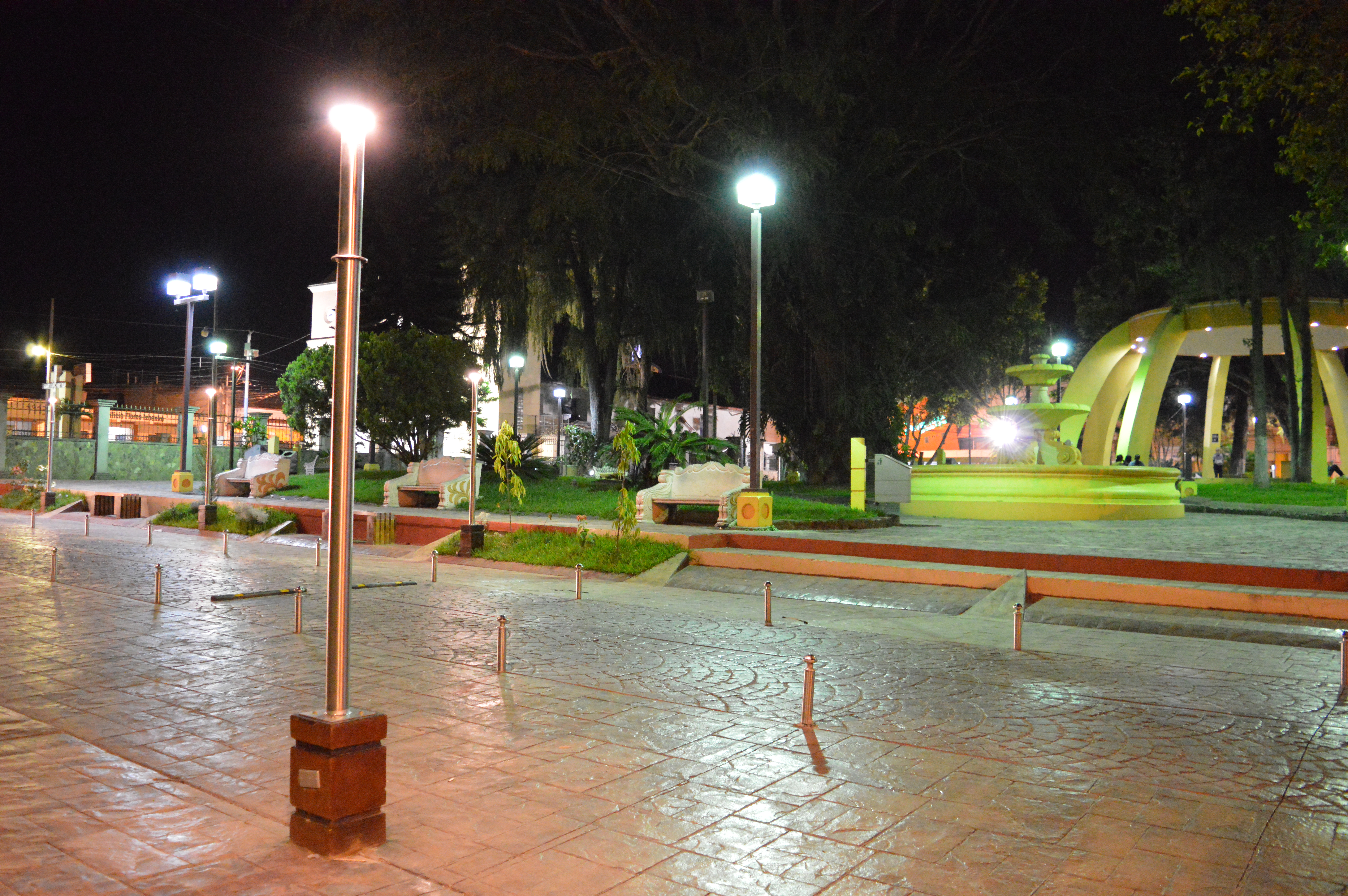 Parque central de la Ciudad de Siguatepeque, calle peatonal los pinares